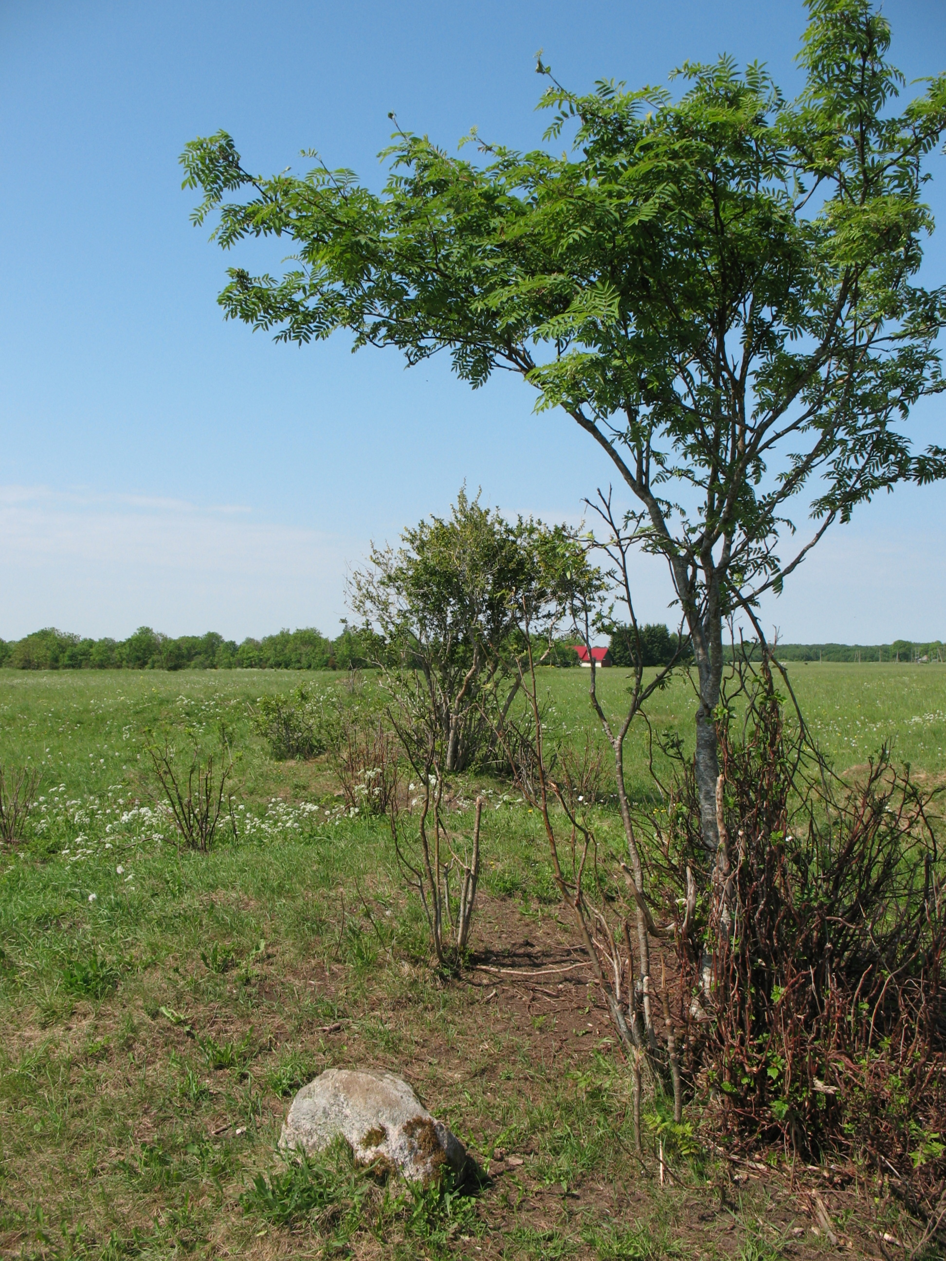 Kivikalme